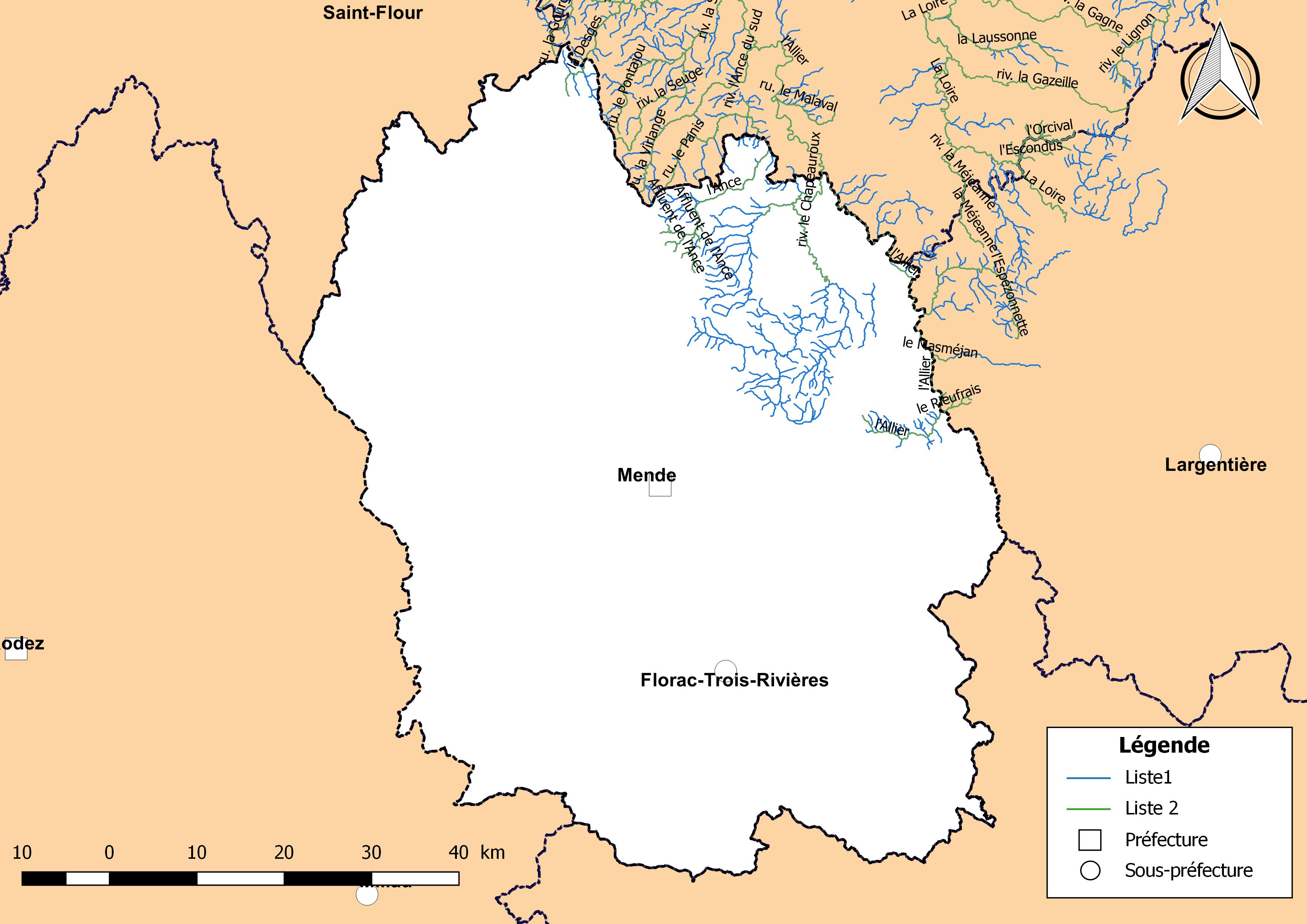 Classement des cours d'eau du département de la Lozère (France) au titre de la continuité écologique (article L214.17 I du Code de l'environnement).